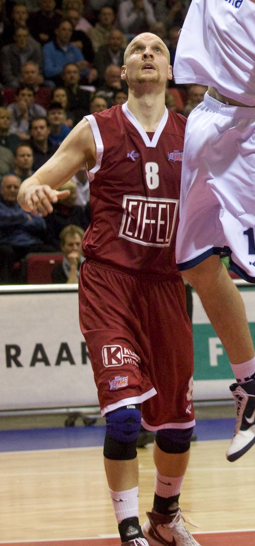 _Q9H0135